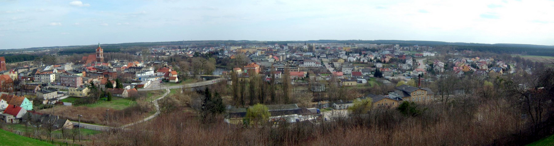 Panorama Golubia-Dobrzynia z tarasu widokowego na zamku (2010-04-04).